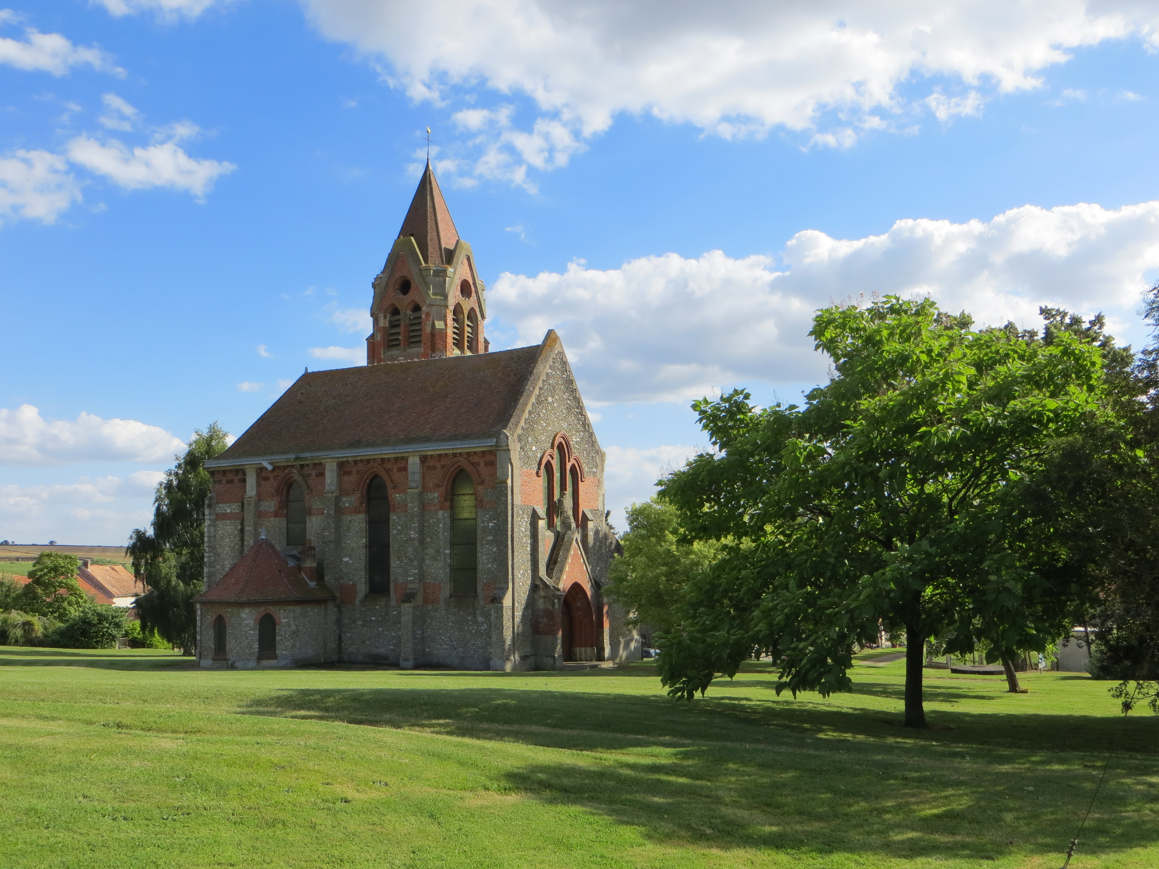 Vue générale de l'église